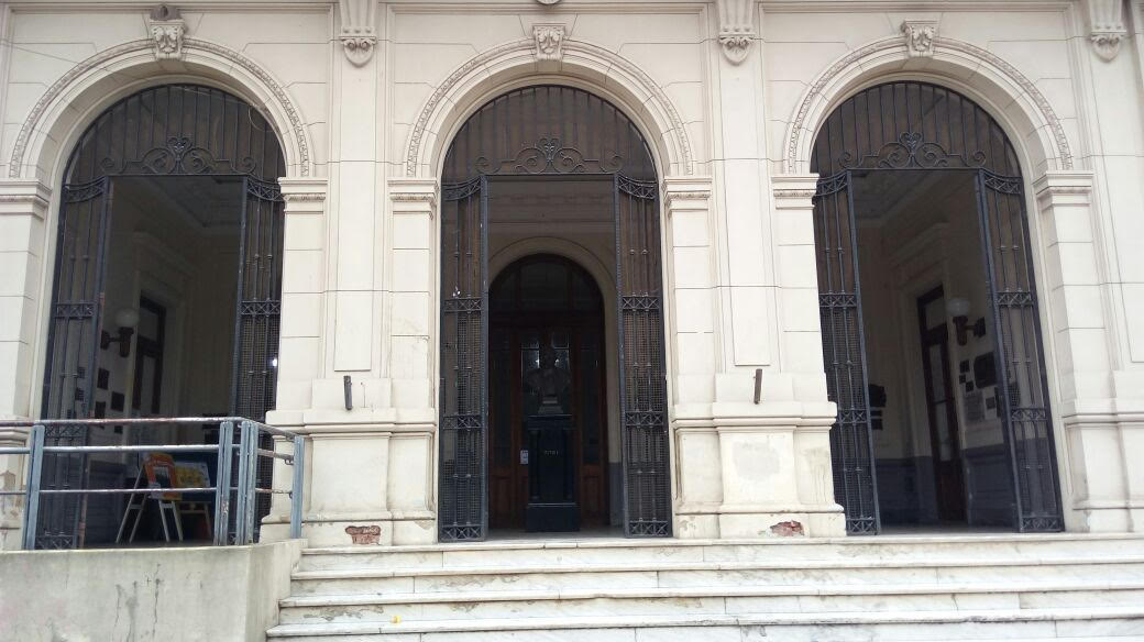 Entra de la Escuela